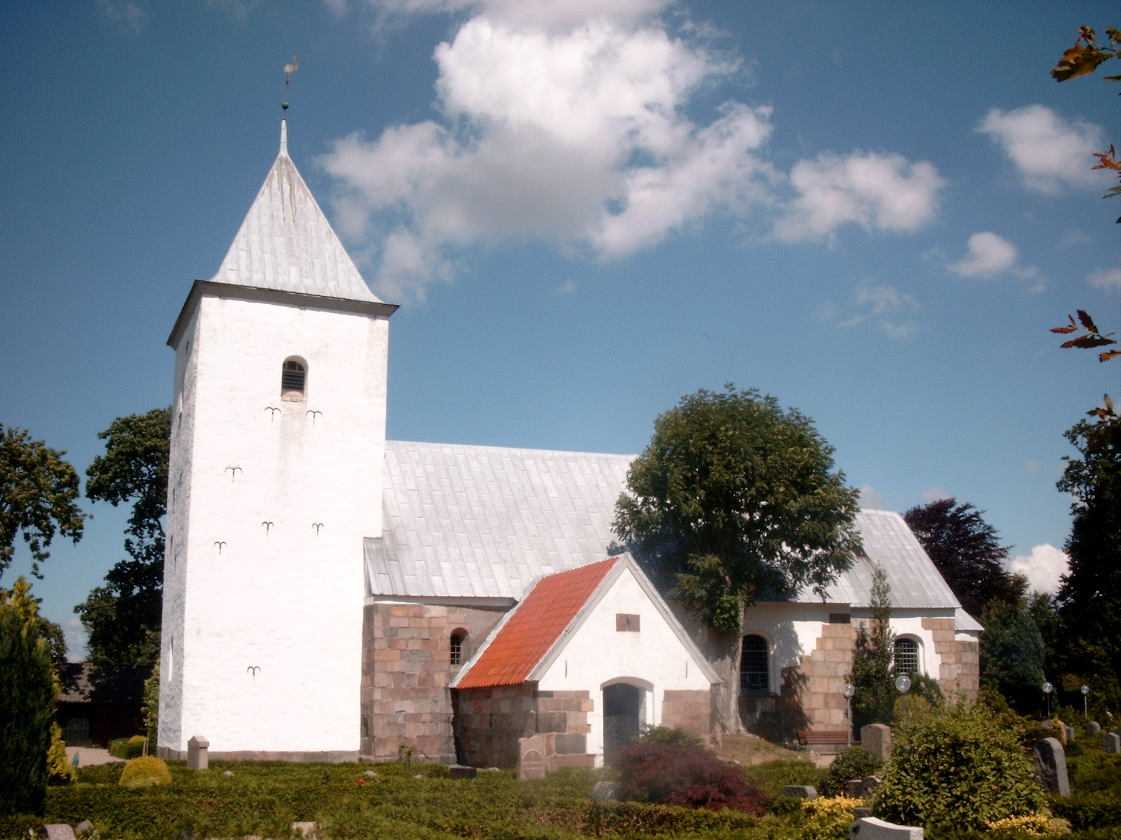 Thorstrup kirke, Thorstup sogn, Varde Kommune (former: Øster Horne Herred, Ribe Amt).